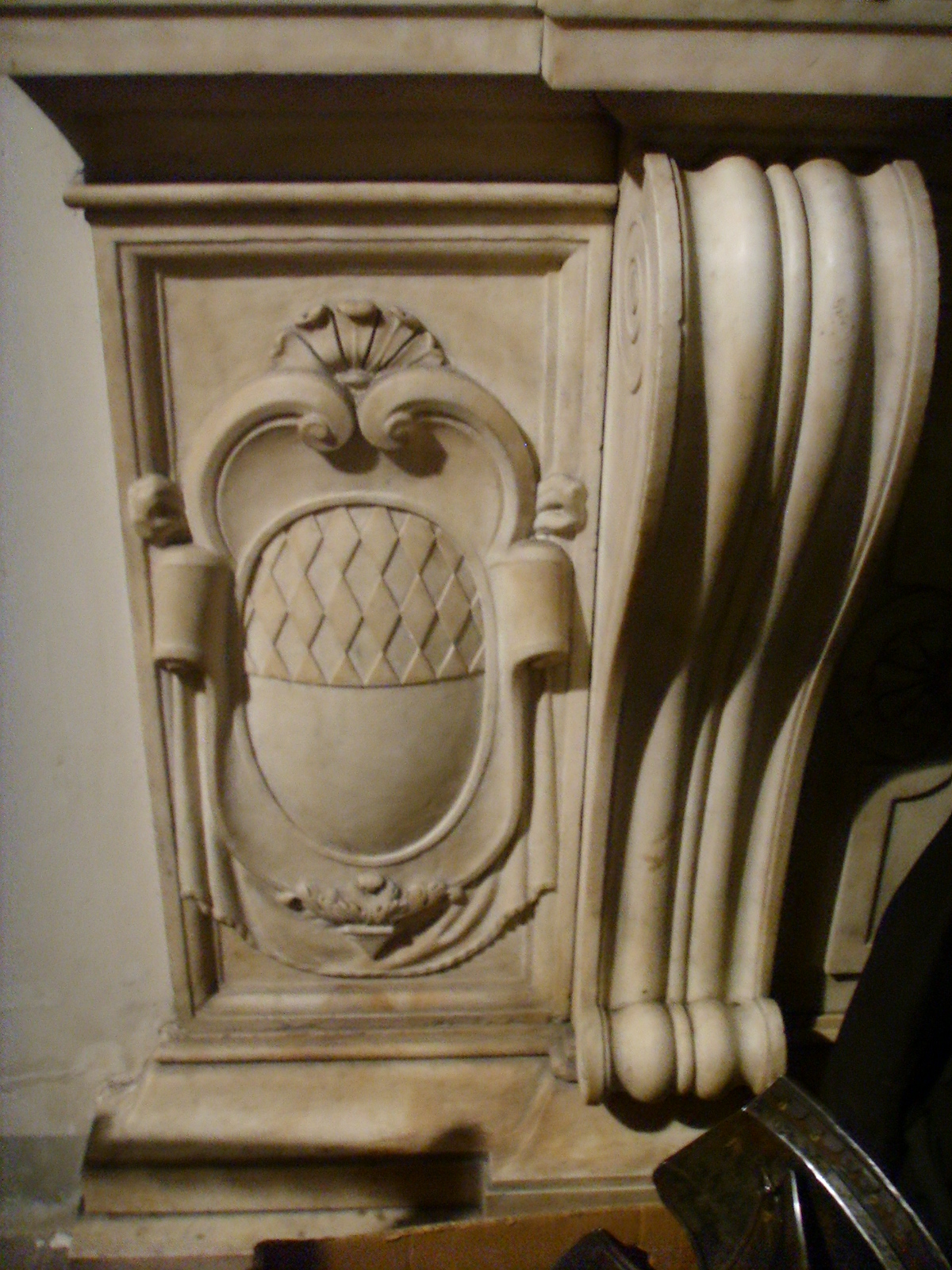 Chiesa di san gaetano, cappella antinori, monumento a alessandro antinori 03 stemma